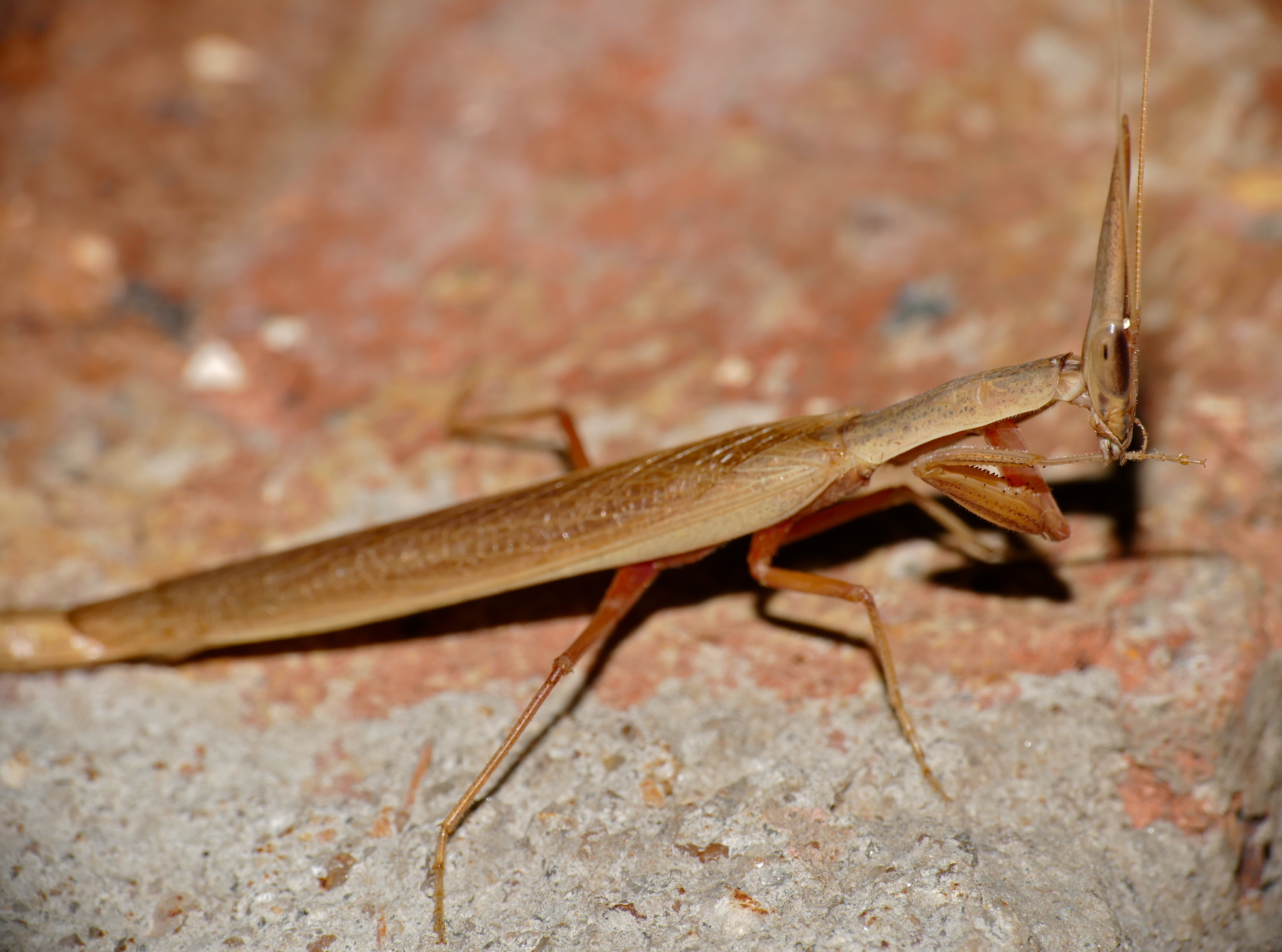 Berg-en-Dal Camp, Kruger NP, SOUTH AFRICA